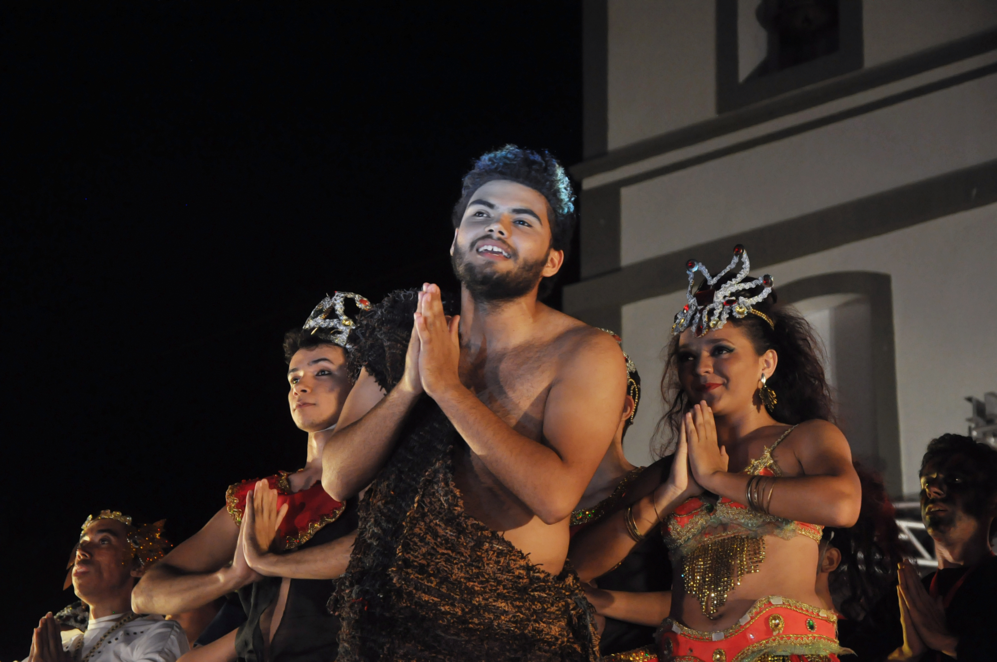 Espetáculo "O Auto de São João Batista", Apodi, Rio Grande do Norte.